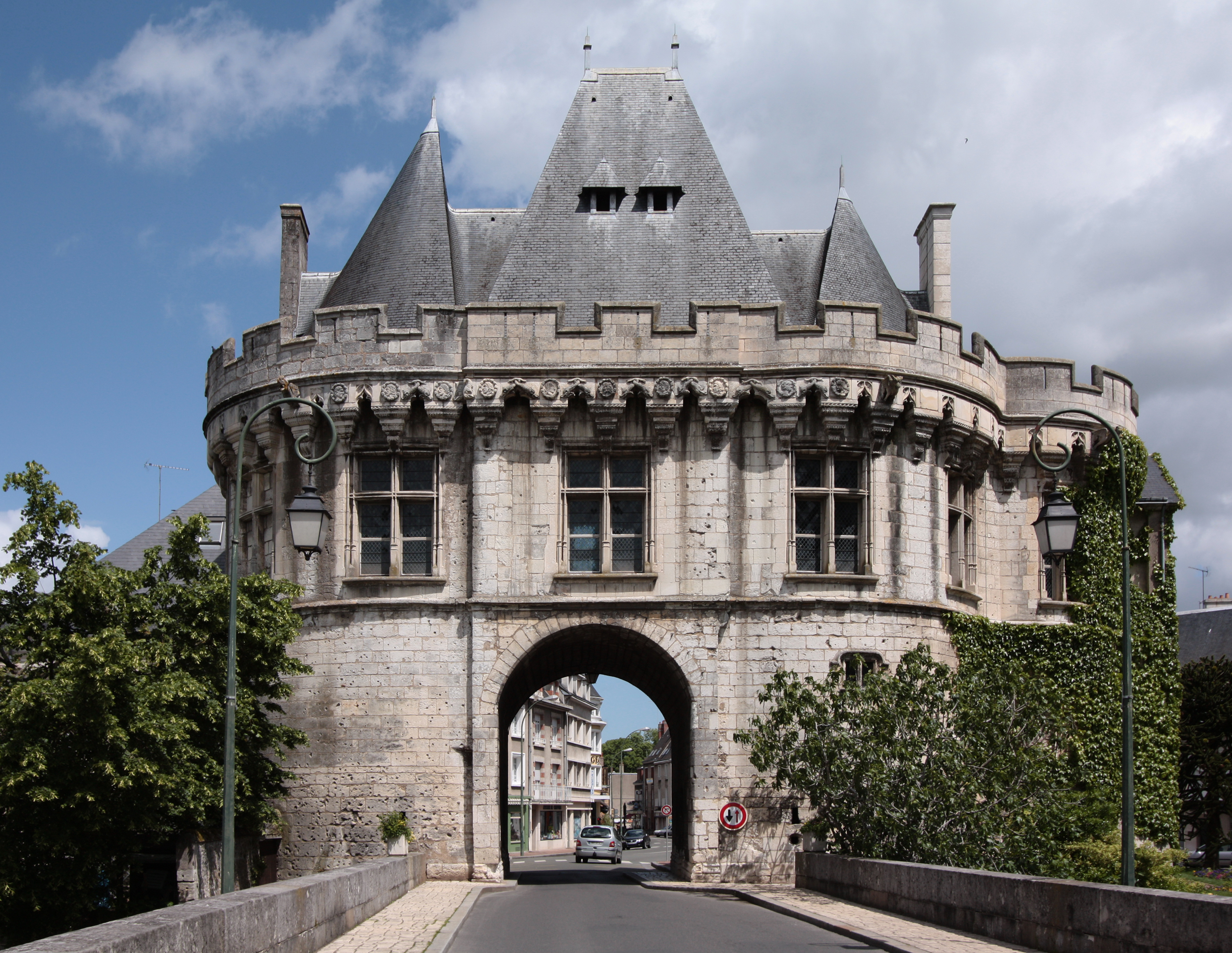 Die Kleinstadt Vendôme im Département Loir-et-Cher/Frankreich - Porte Saint-Georges